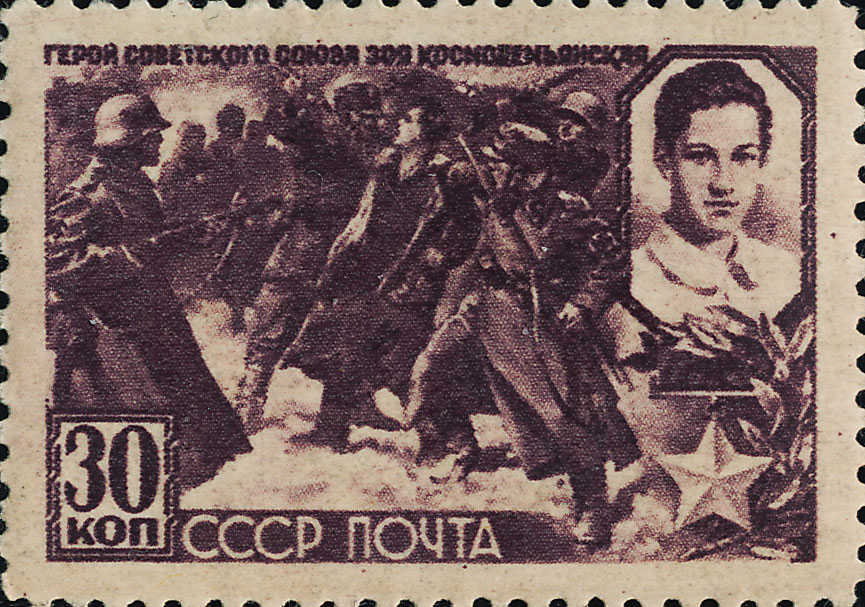 Почтовая марка СССР - Космодемьянская Зоя Анатольевна, Герой Советского Союза